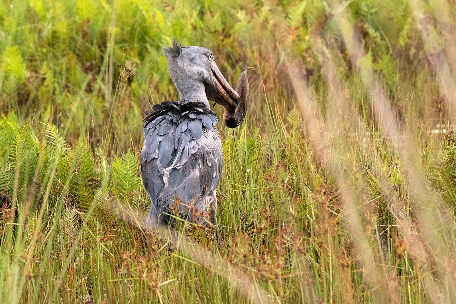 tynnwyd yng Nghors Mabamba, Uganda, Chwefror 2020